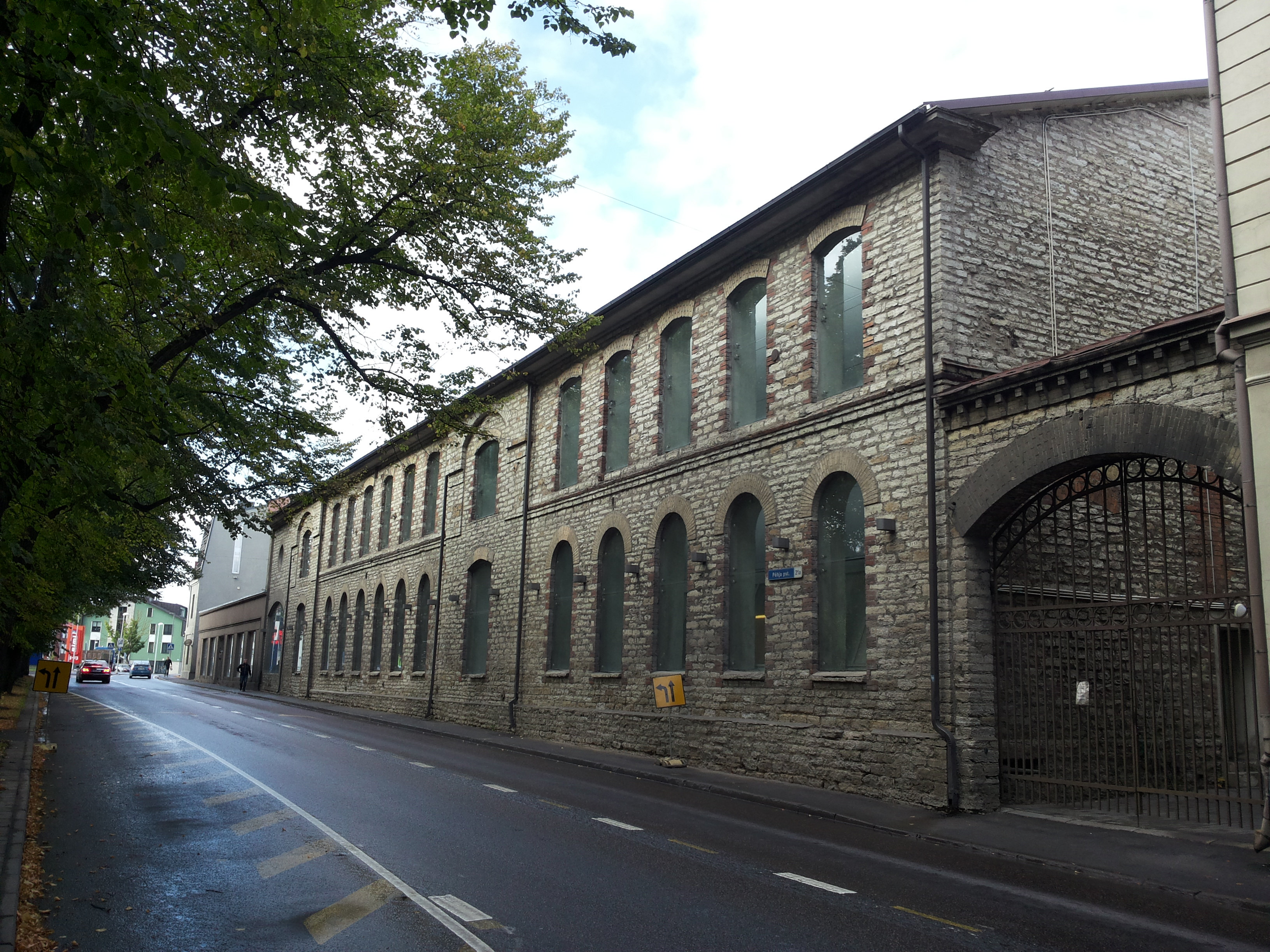 P. Wiegandi masinatehase masinatsehh, 1881–1883